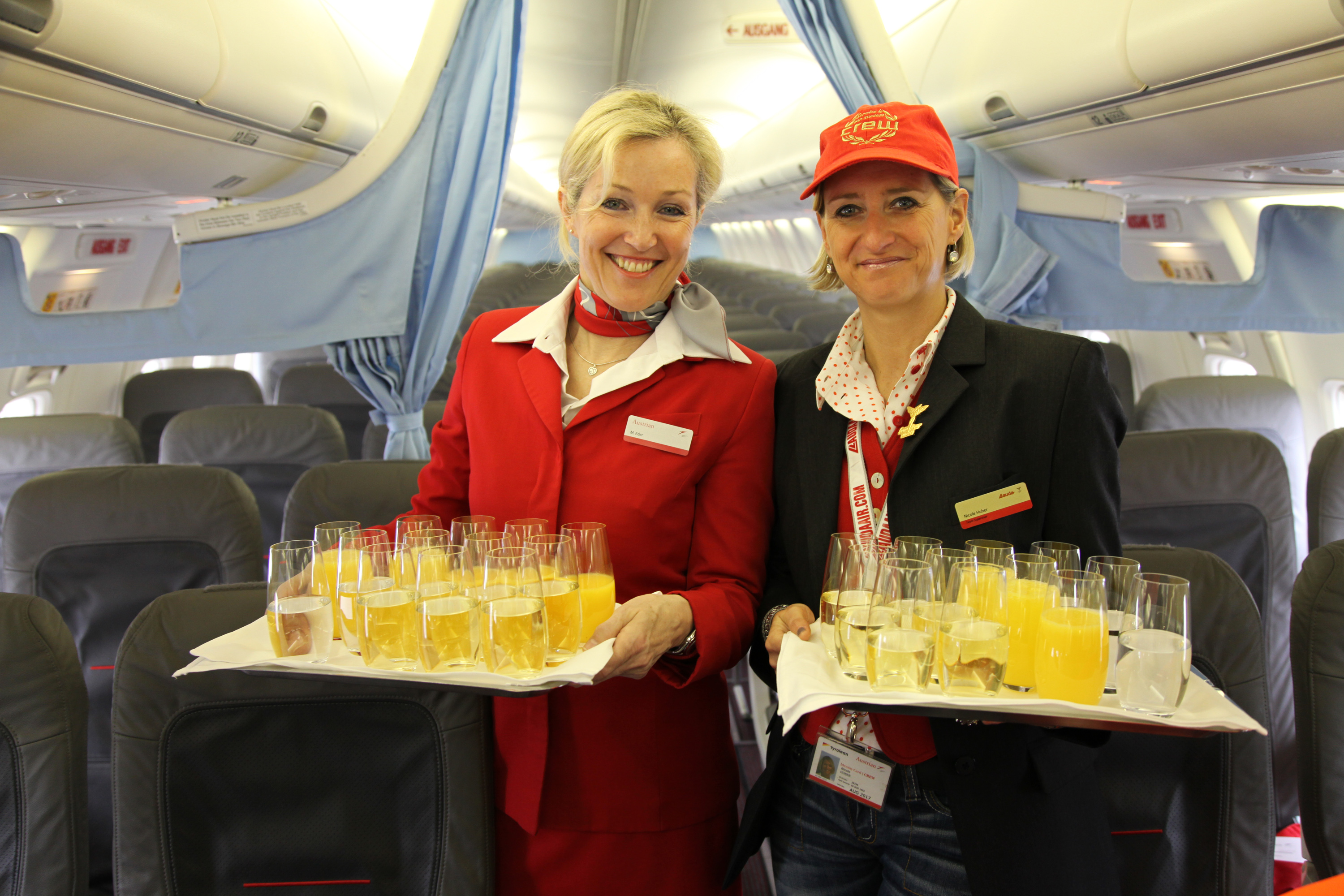 Lauda Air Abschied Boeing 737